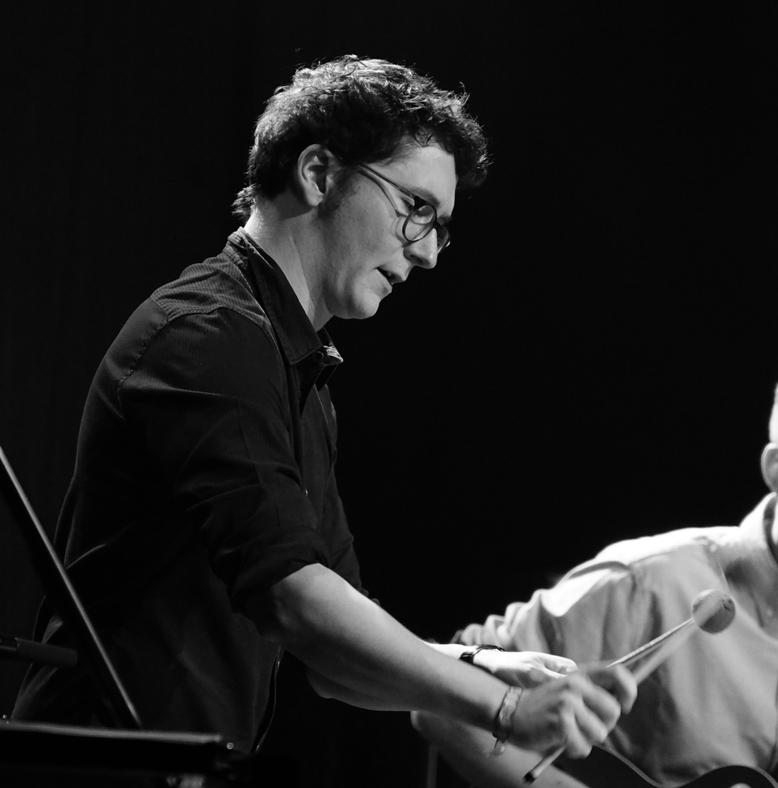 en concert à la Cartonnerie de Reims.